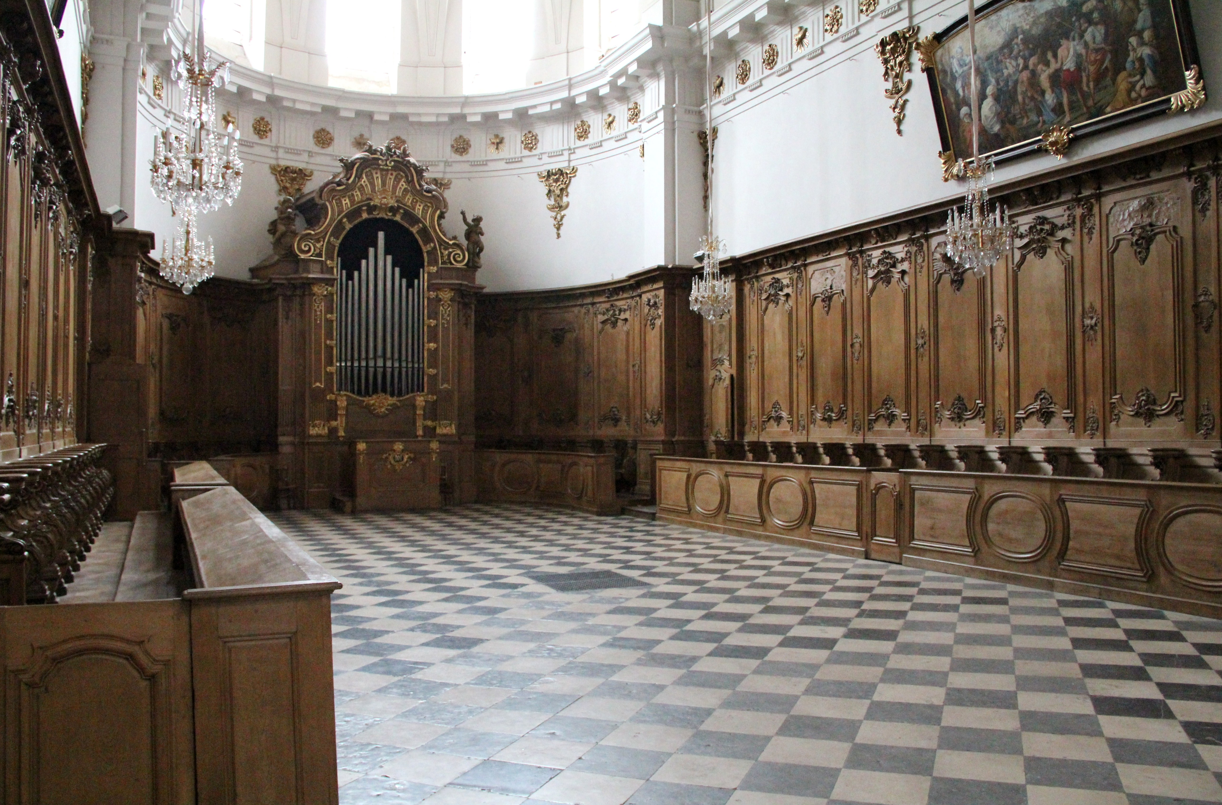 Lyon (Rhône, France), église St Bruno-les-Chartreux, stalles et orgue de chœur dont le buffet est classé M.H..